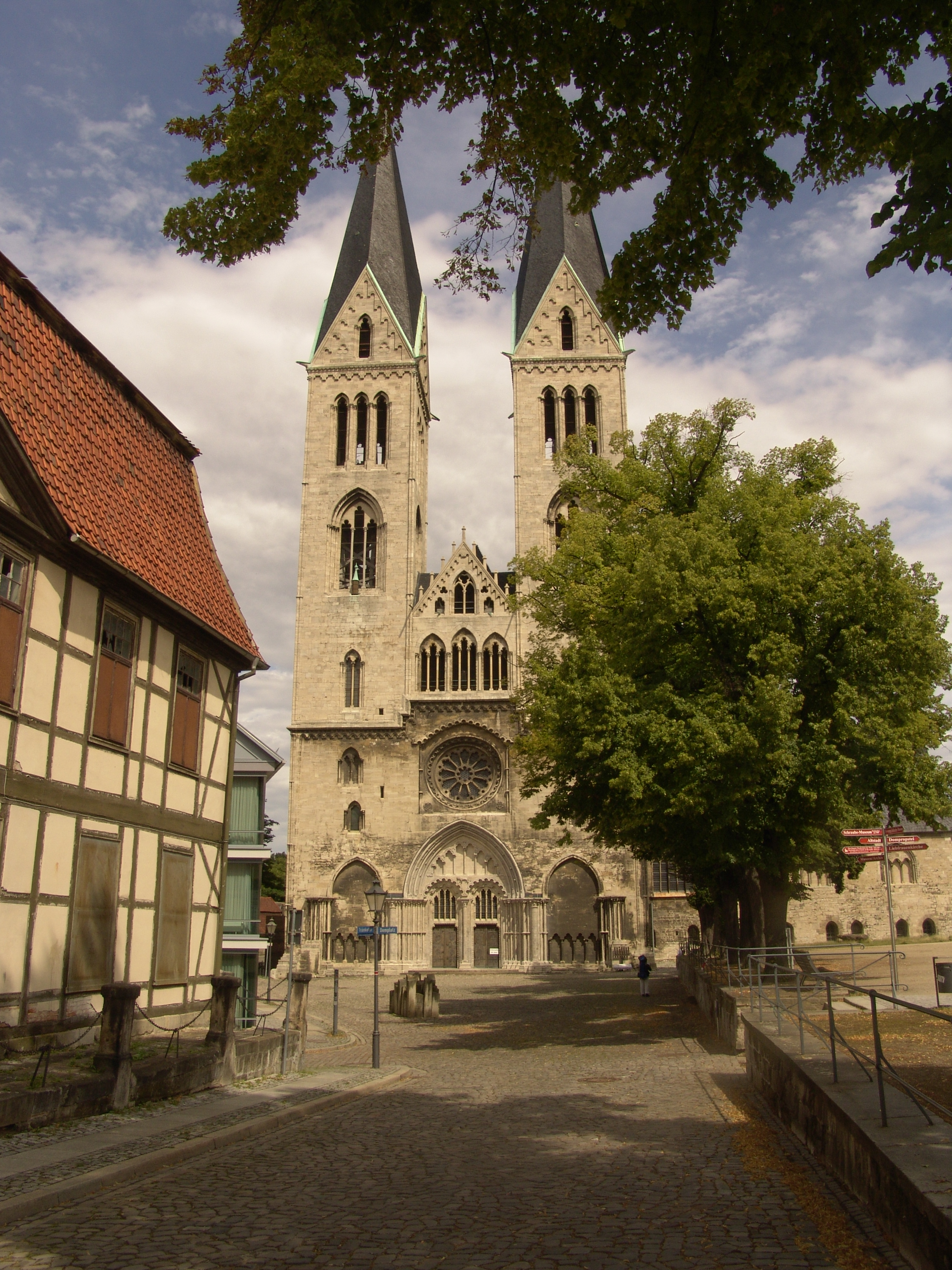 Halberstädter Dom, Exterior